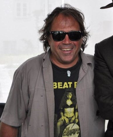 Pero Lovšin